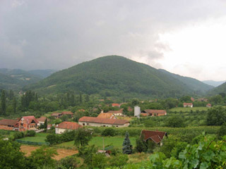 Prevest